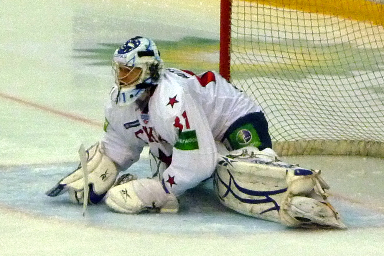 Голкипер питерского СКА Якуб Штепанек разминается после возвращения на лёд во втором периоде матча против нижегородского «Торпедо» 12 декабря 2010